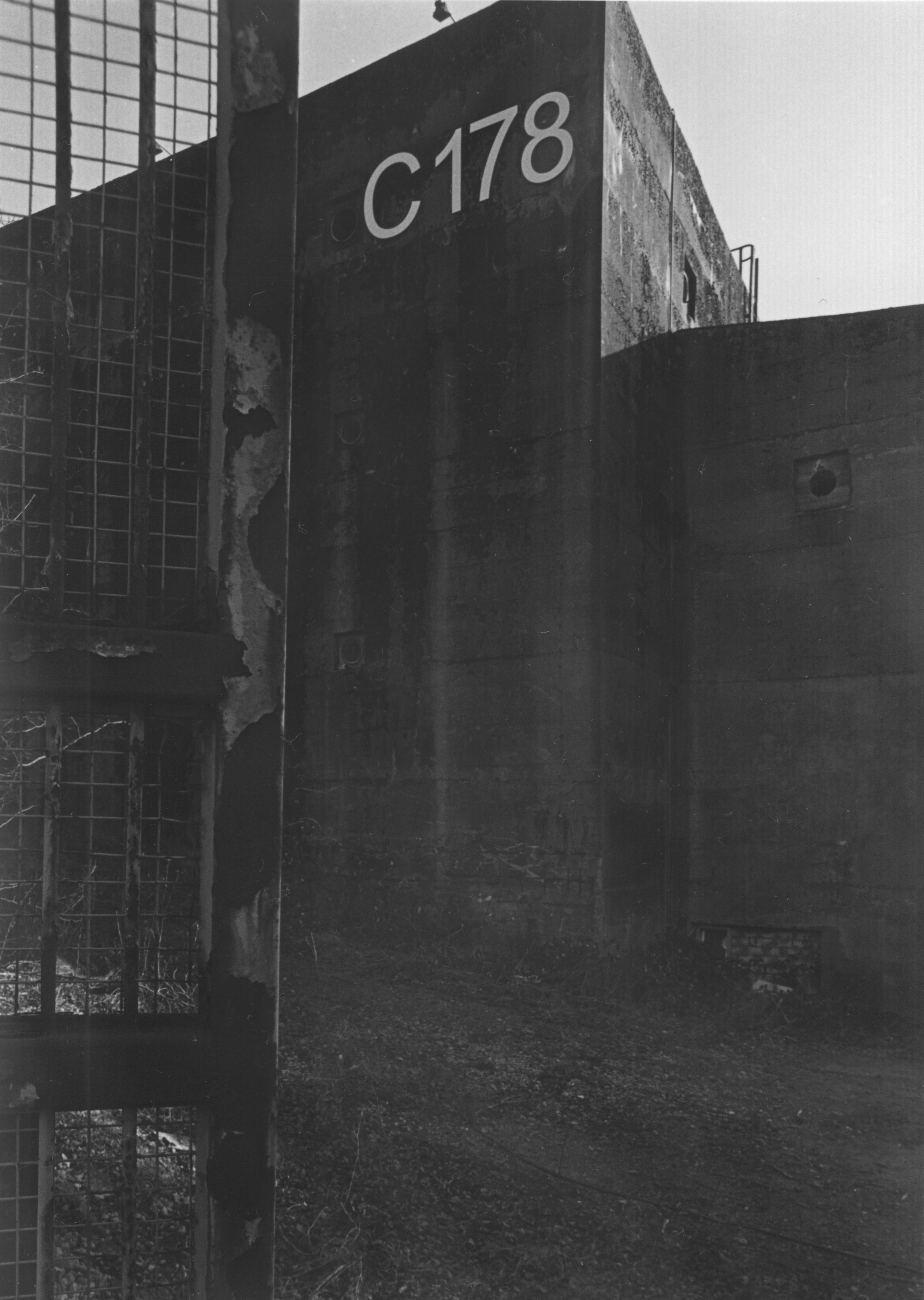 Bunker C178 auf dem gelände des Bremer Vulkan (Werft)